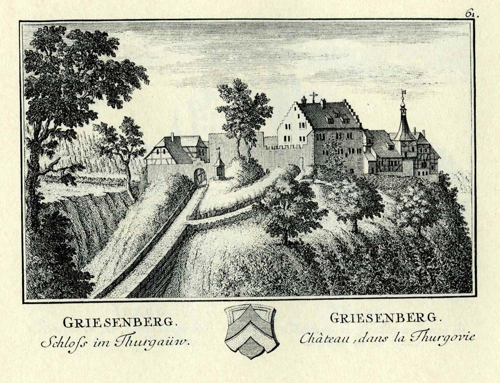 Ehemalige Burg der Herren von Griesenberg, erbaut 1291; 1406 im Appenzellerkrieg und 1444 durch die Schwyzer im Alten Zürichkrieg beschädigt. 1760 stürzten die Gebäude wegen Unterhöhlung des Felsens in die Tiefe.